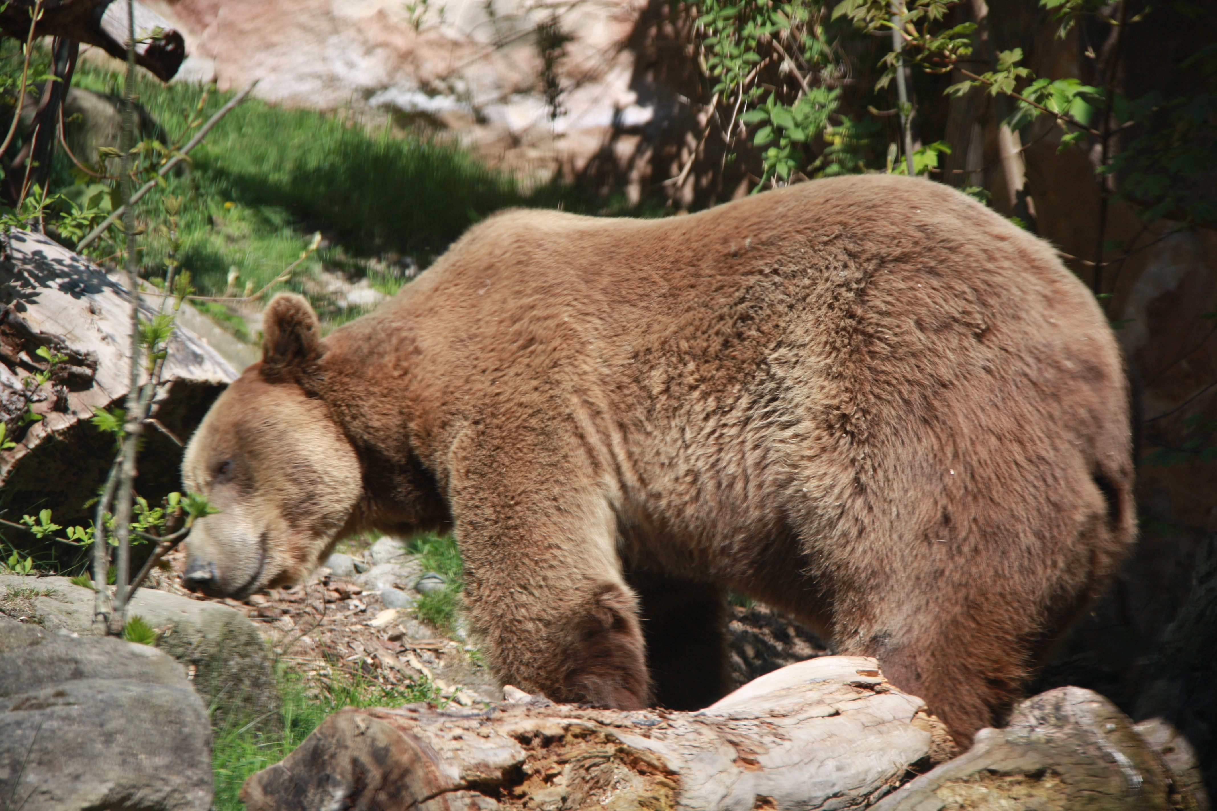 Braunbär im Alpenzoo - Innsbruck